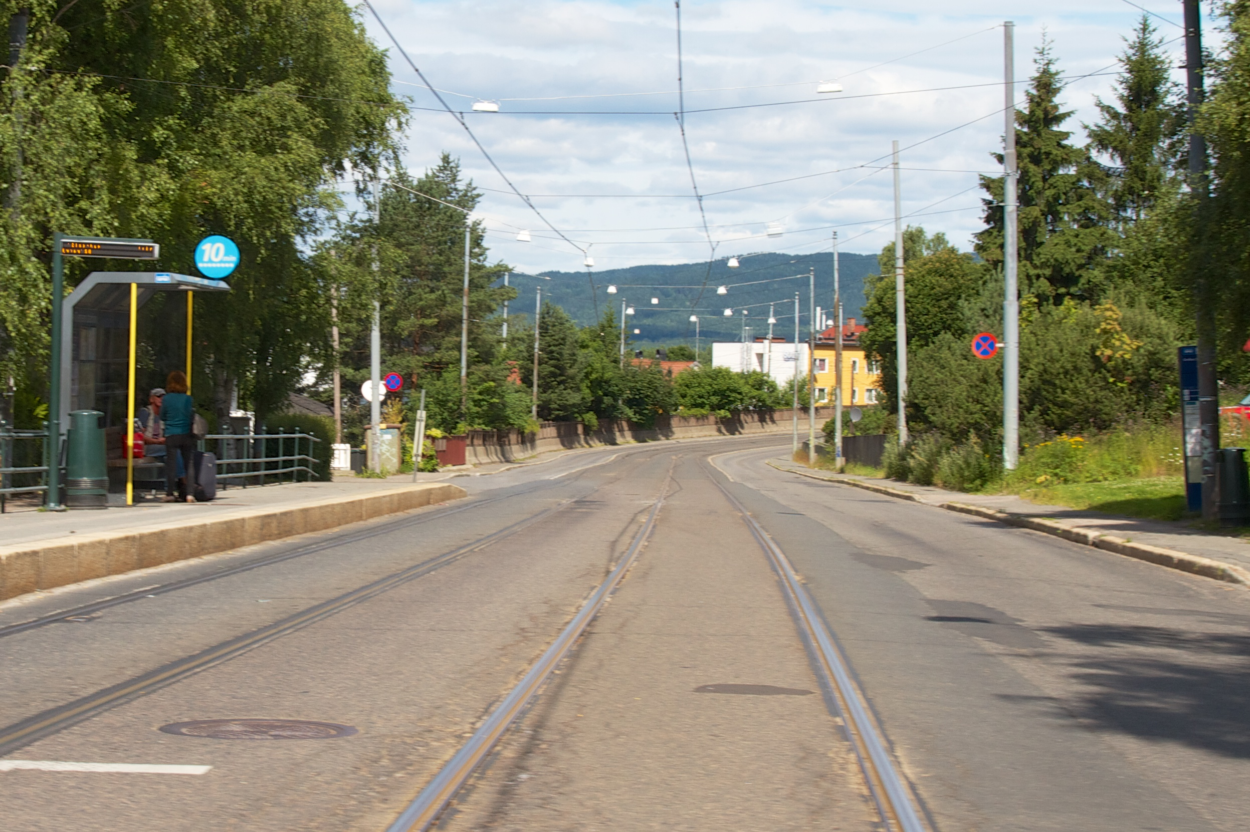 Grefsen stadion holdeplass